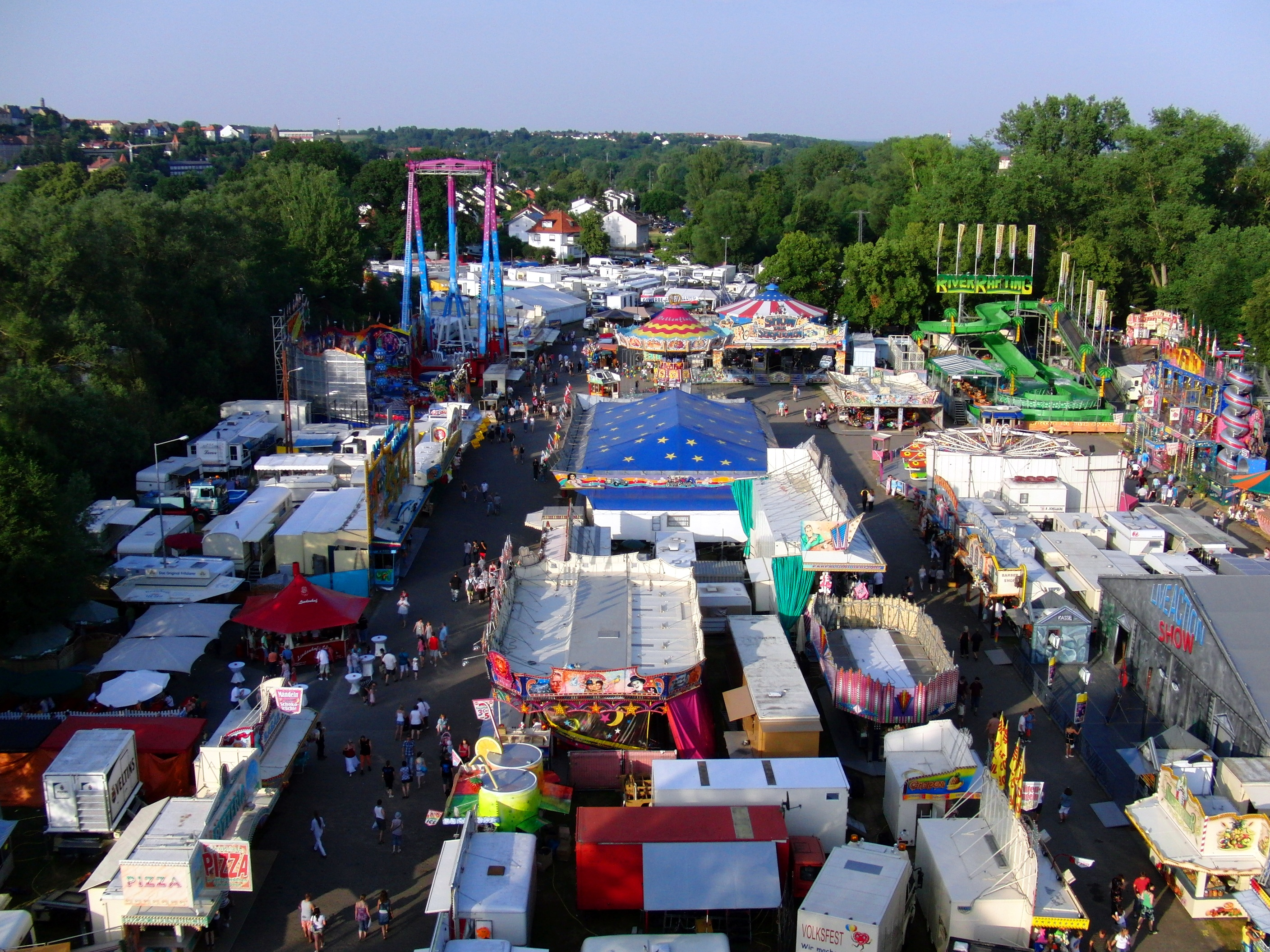 Der Pferdemarkt in Fritzlar vom Riesenrad aus fotografiert